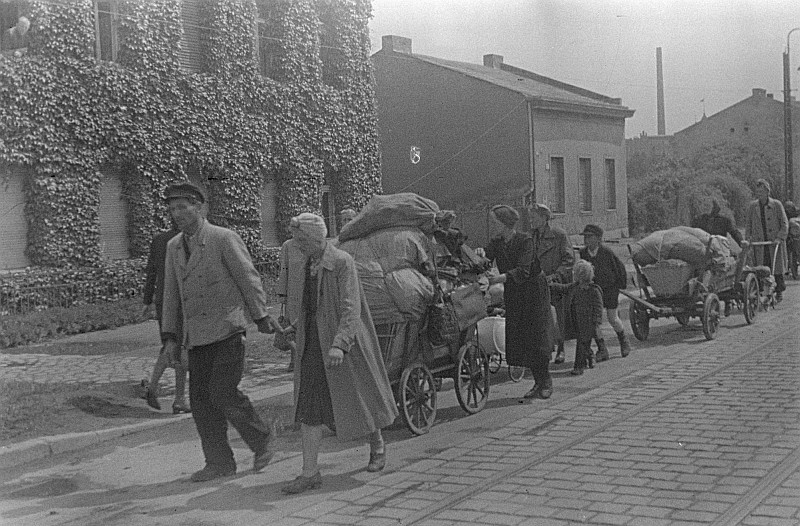 Original image description from the Deutsche Fotothek Mann repariert Fahrradschlauch - Frauen holen Wasser am Brunnen auf der Straße